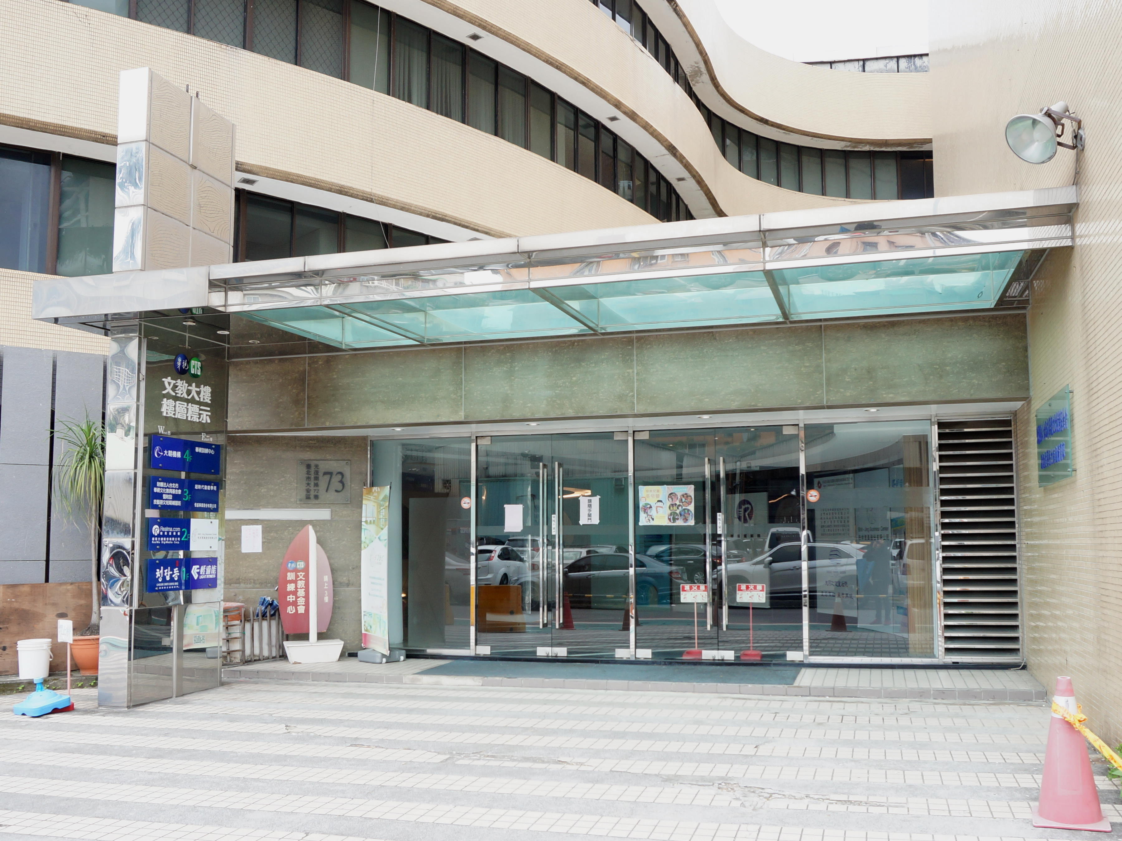 中文（台灣）: 中華電視公司文教大樓大門。